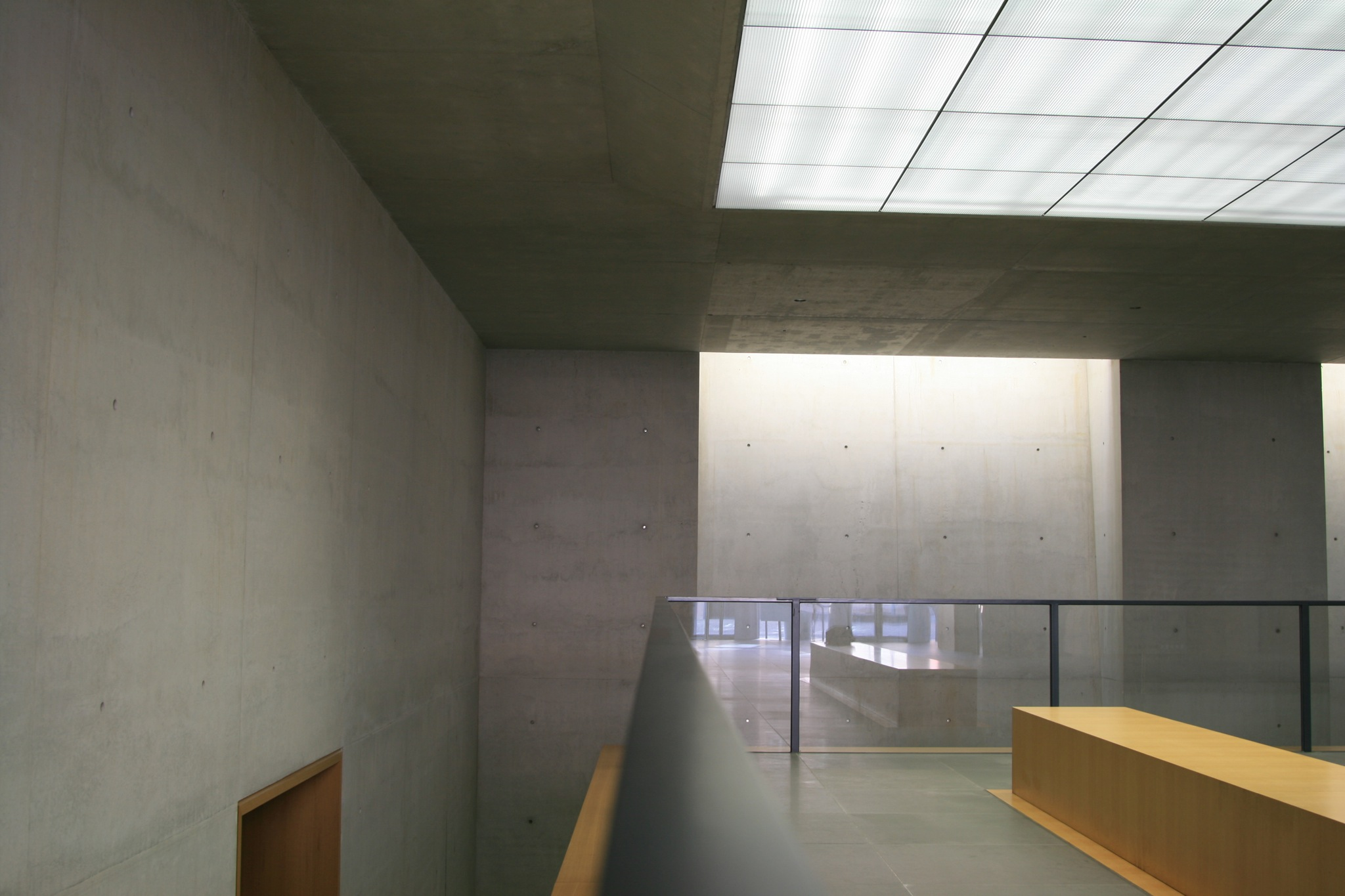 Innenraum des Neuen Museum in Nürnberg